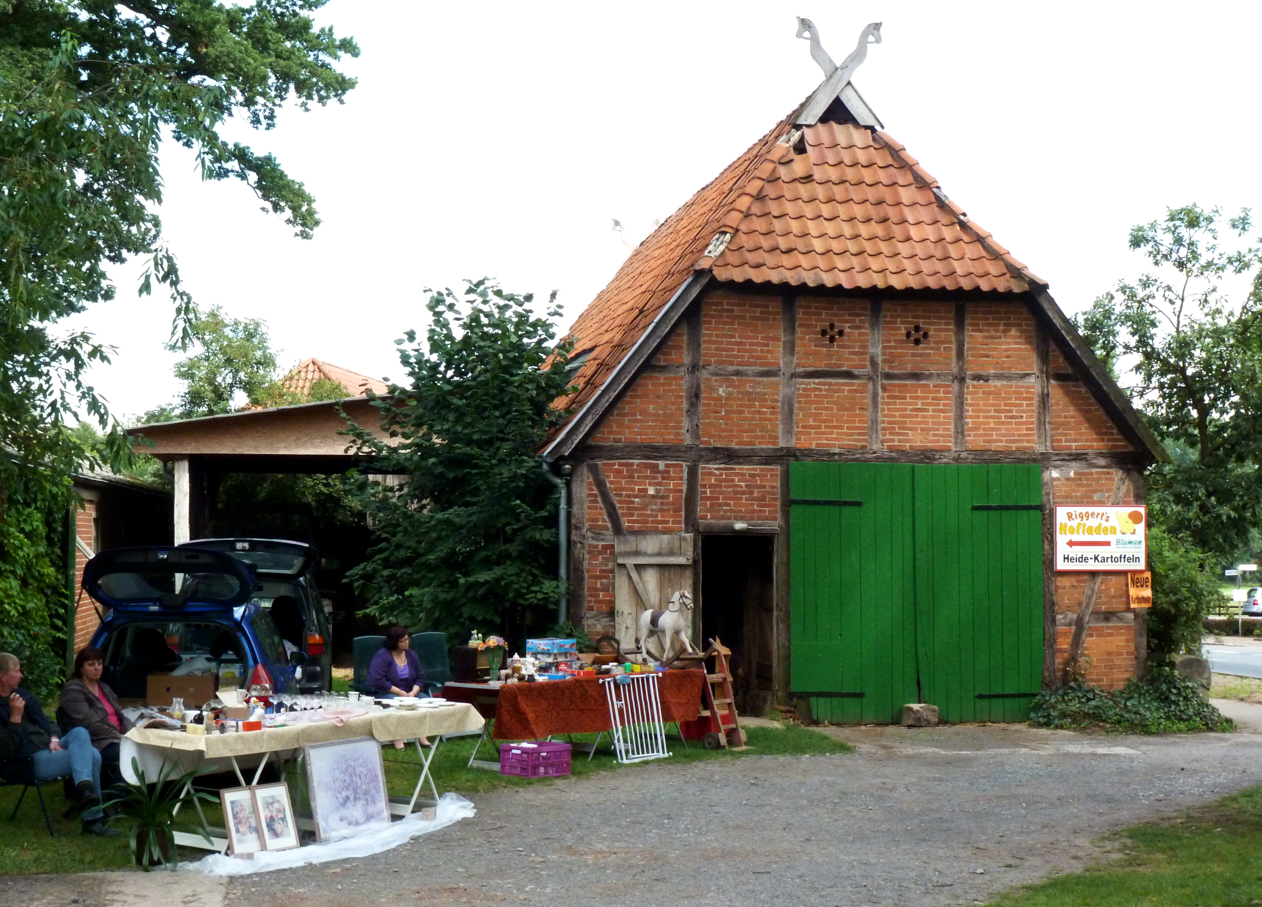 Flohmarkt auf dem Bauernhof der Familie Riggert in Eimke, Niedersachsen, DE. Stall- und Scheunengebäude im Fachwerkstil.